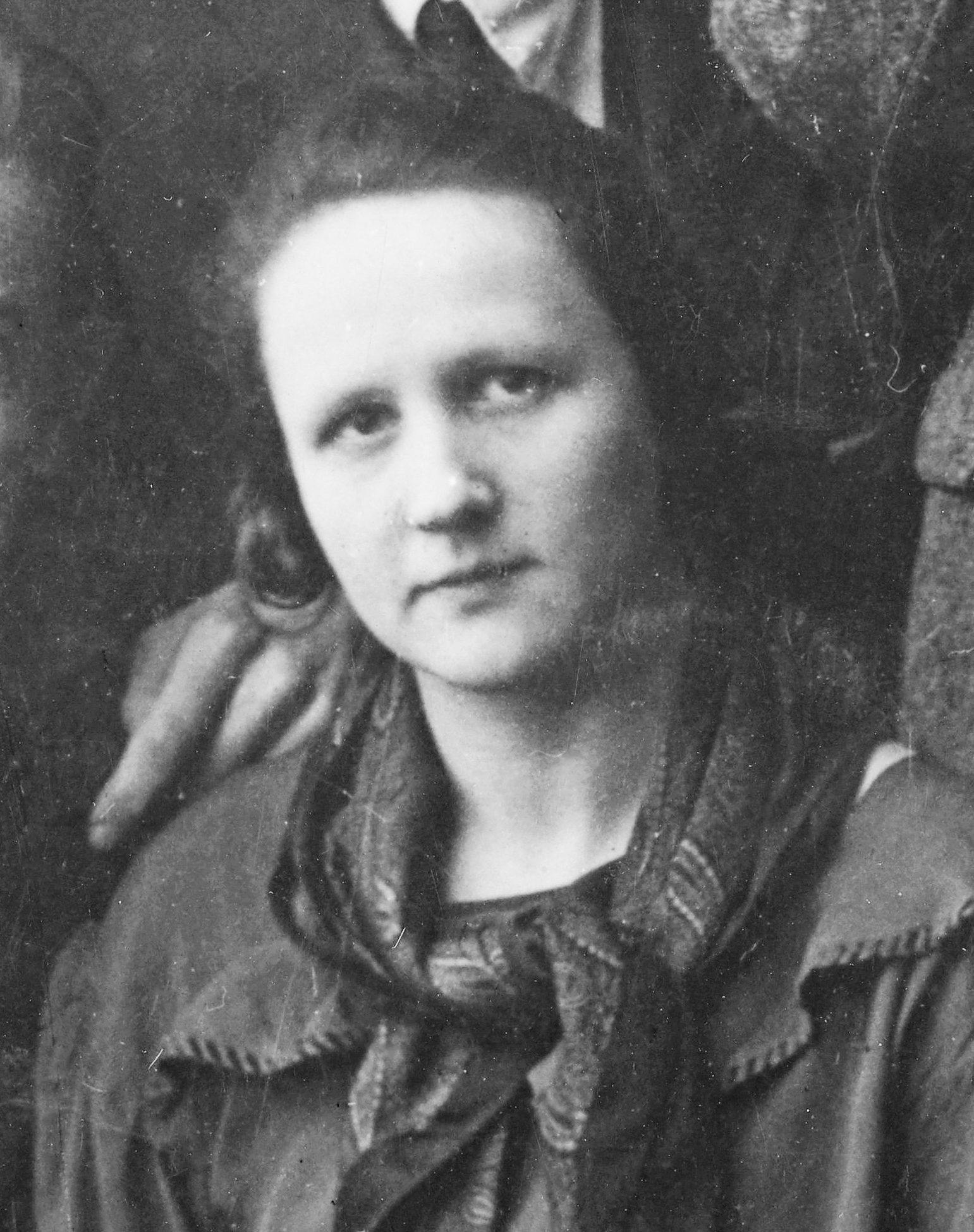 Fragment fotografii grupowej Komitetu Paryskiego z 1925 roku - na zbliżeniu widoczna Hanna Rudzka-Cybis (1897-1988).